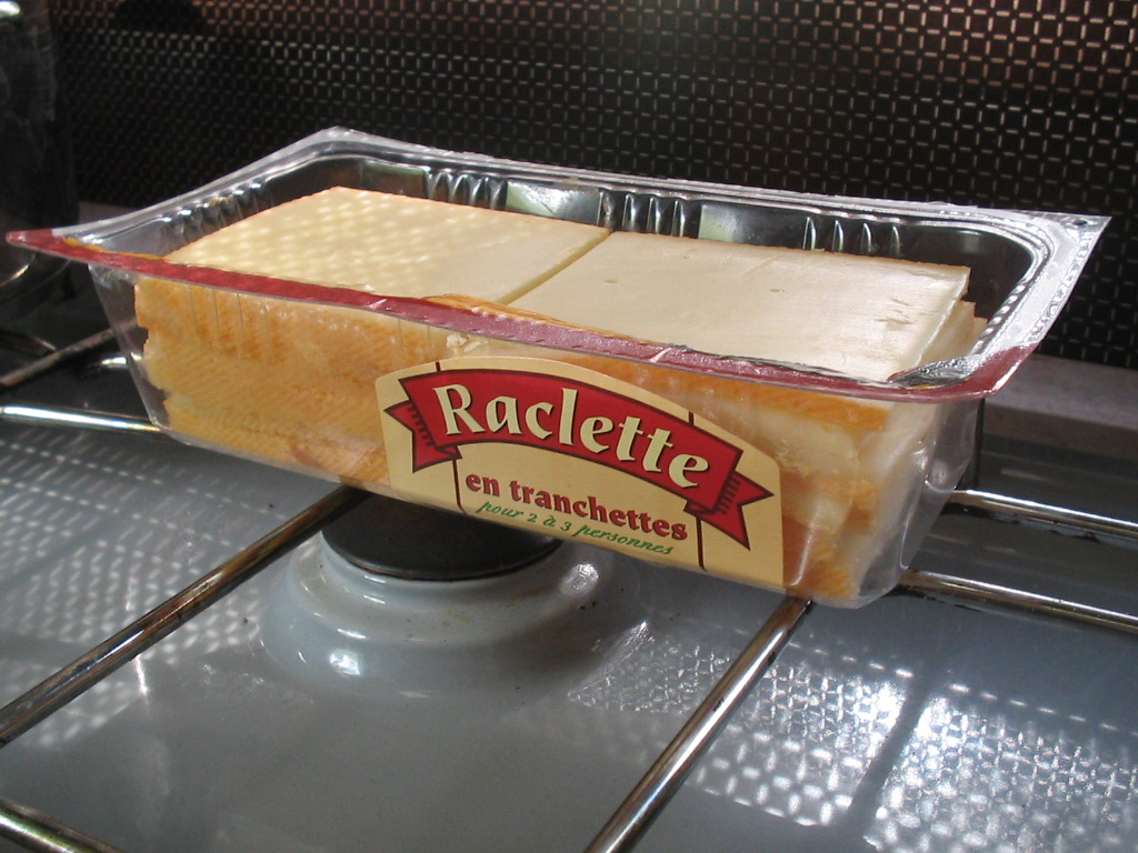 raclette cheese, France, june 2005